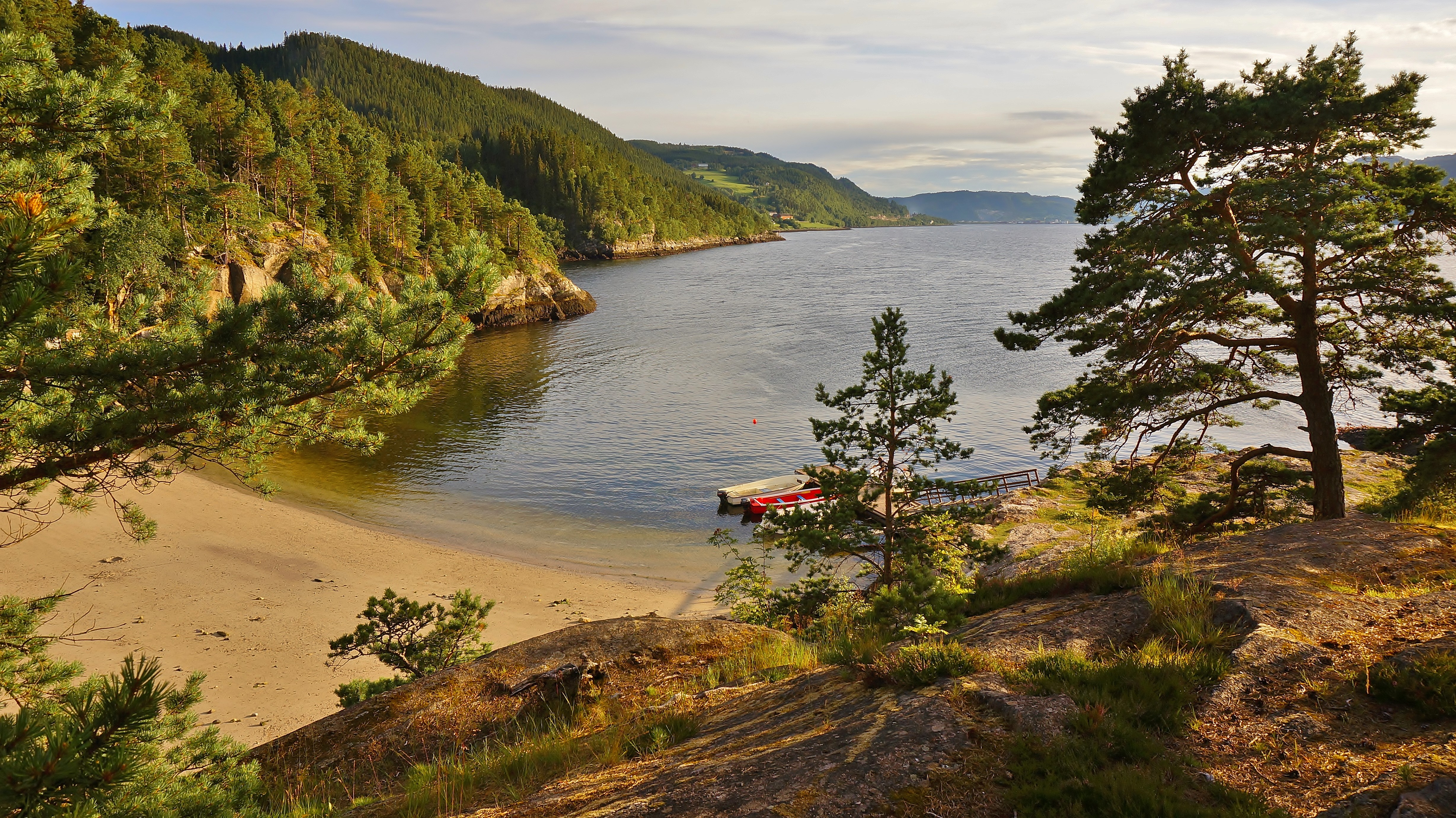 Trasavika Camping Norwegen